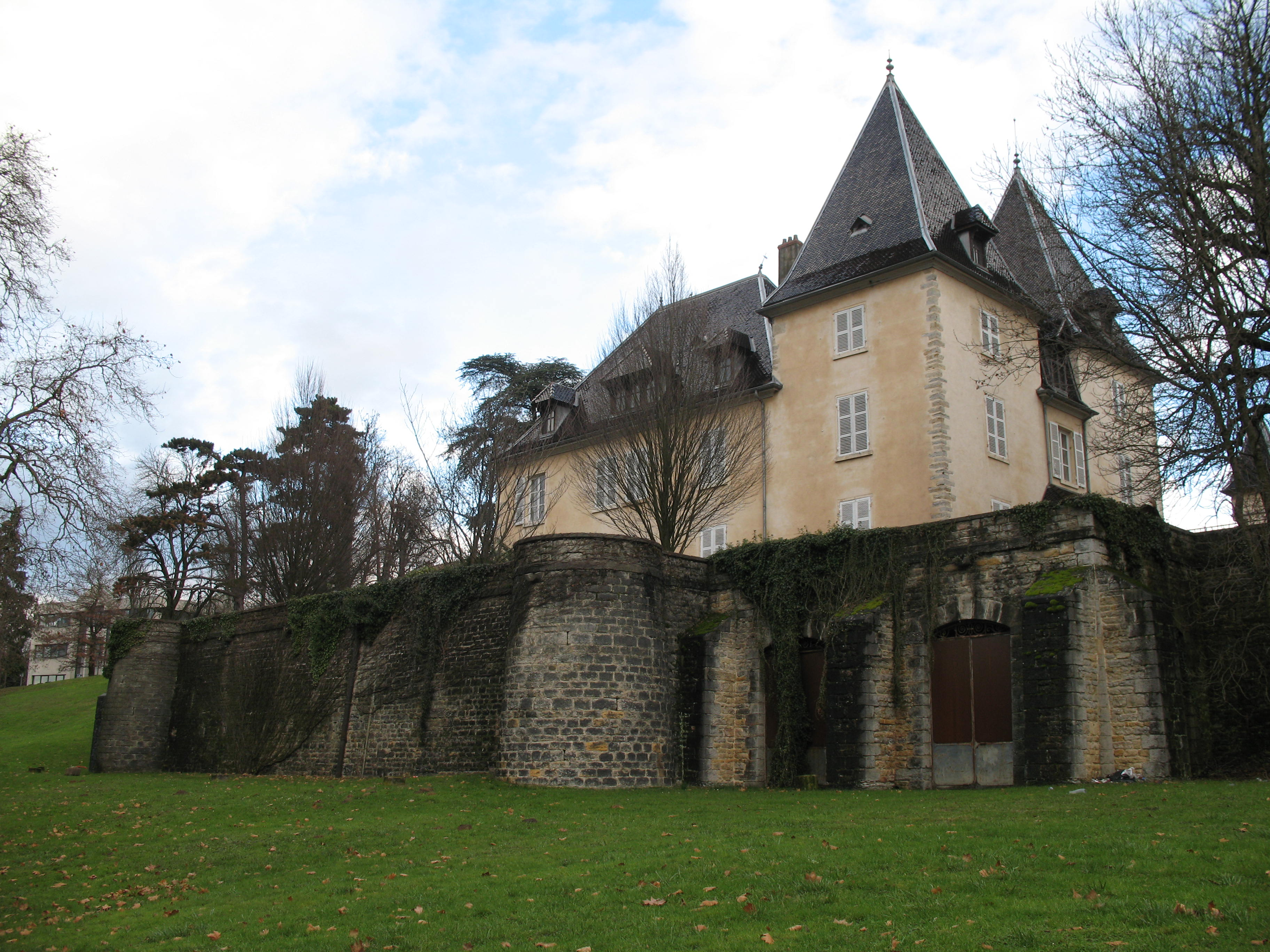 Château de Sans-Souci à Limonest dans le Rhône